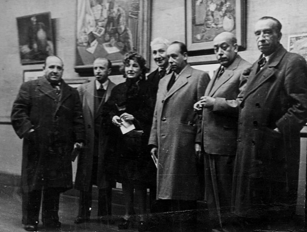 Miembros del grupo Montparnasse, de izq. a der.: 1º¿? 2º José Perotti, 3ª Enriqueta Petit; 4º Luis Vargas Rosas, 6º¿? 7º Juan Emar; 8º¿?